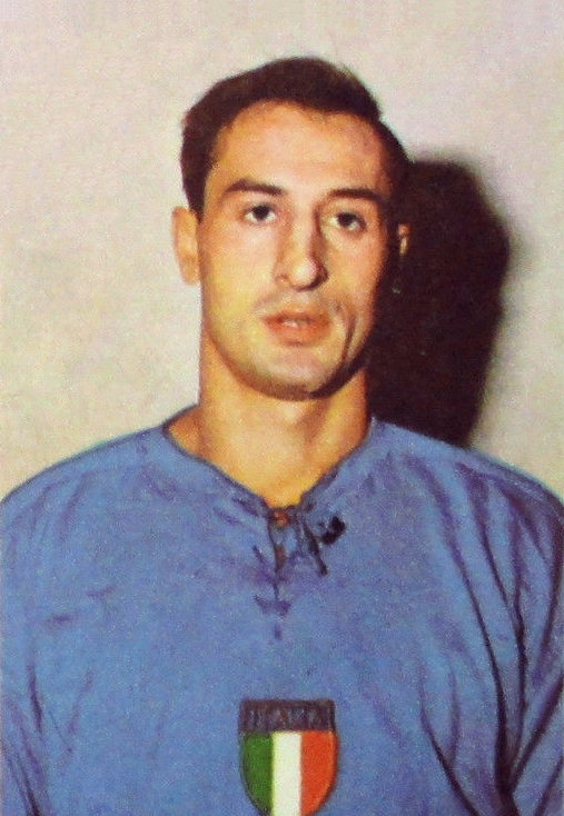 Figurina CAMPIONI DELLO SPORT 1970/71-n.192-DARIN-HOCKEY GHIACCIO-rec